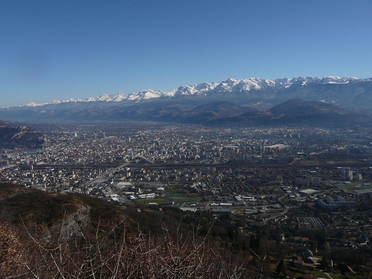 Grenoble depuis le Vercors